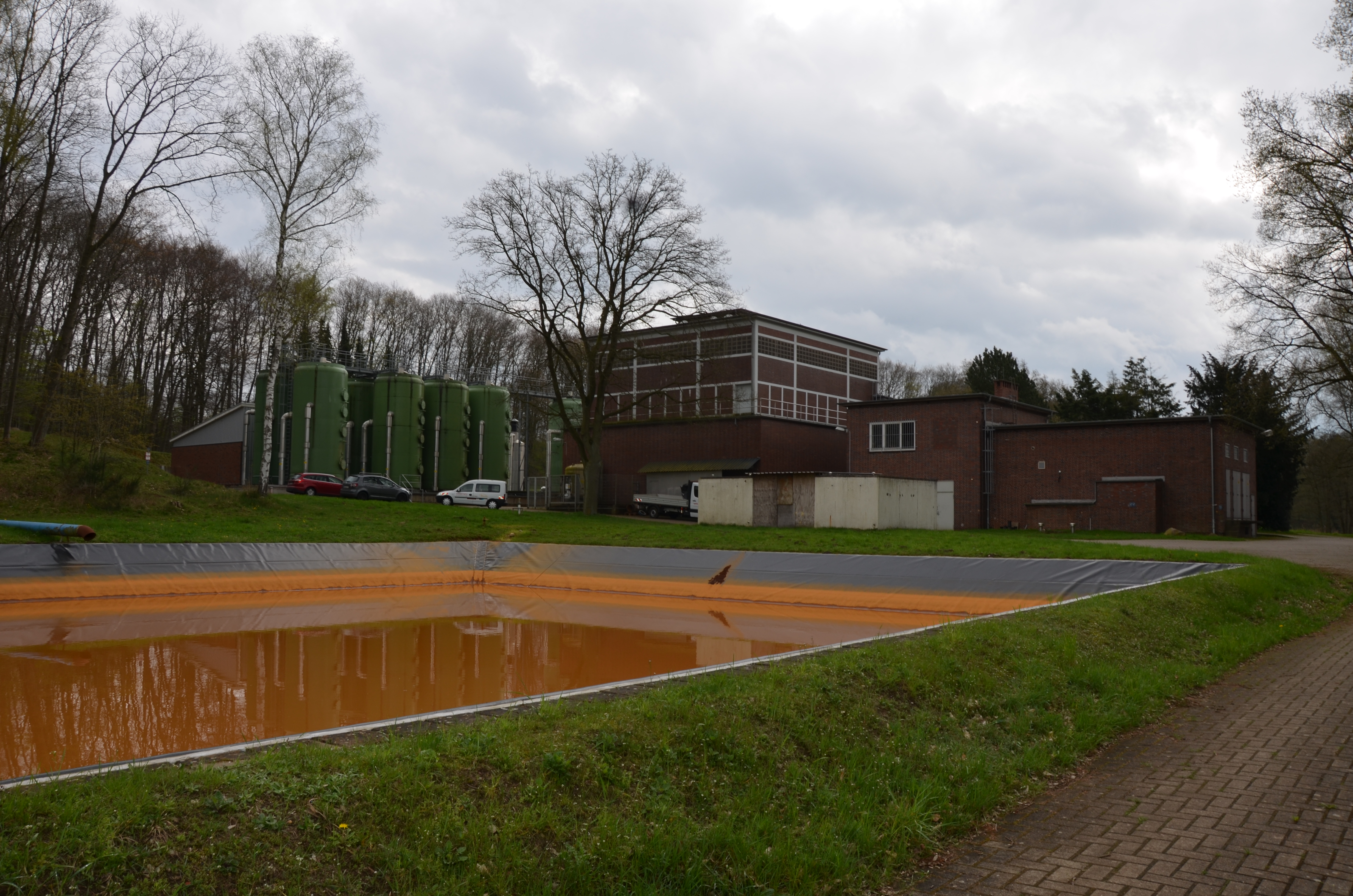 Wasserwerkgelände an der Blumenthaler Aue, Lüssum (Bremen-Blumenthal), April 2014, Wasserschutzgebiet Blumenthal, LSG „Bremen 1968 3. Änderung“